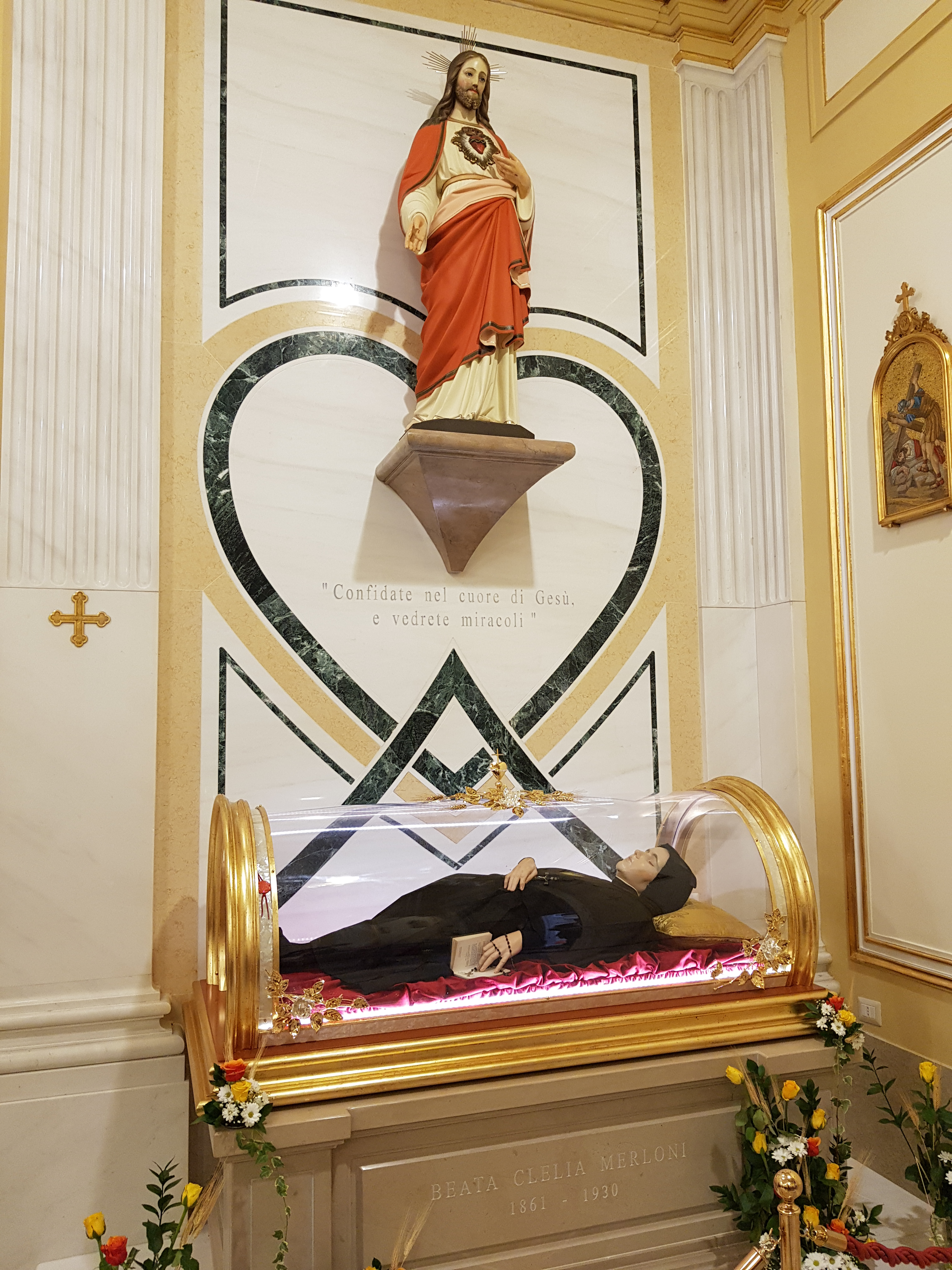 Das Grab der selige Clelia Merloni in der Hauskapelle des Generalats.